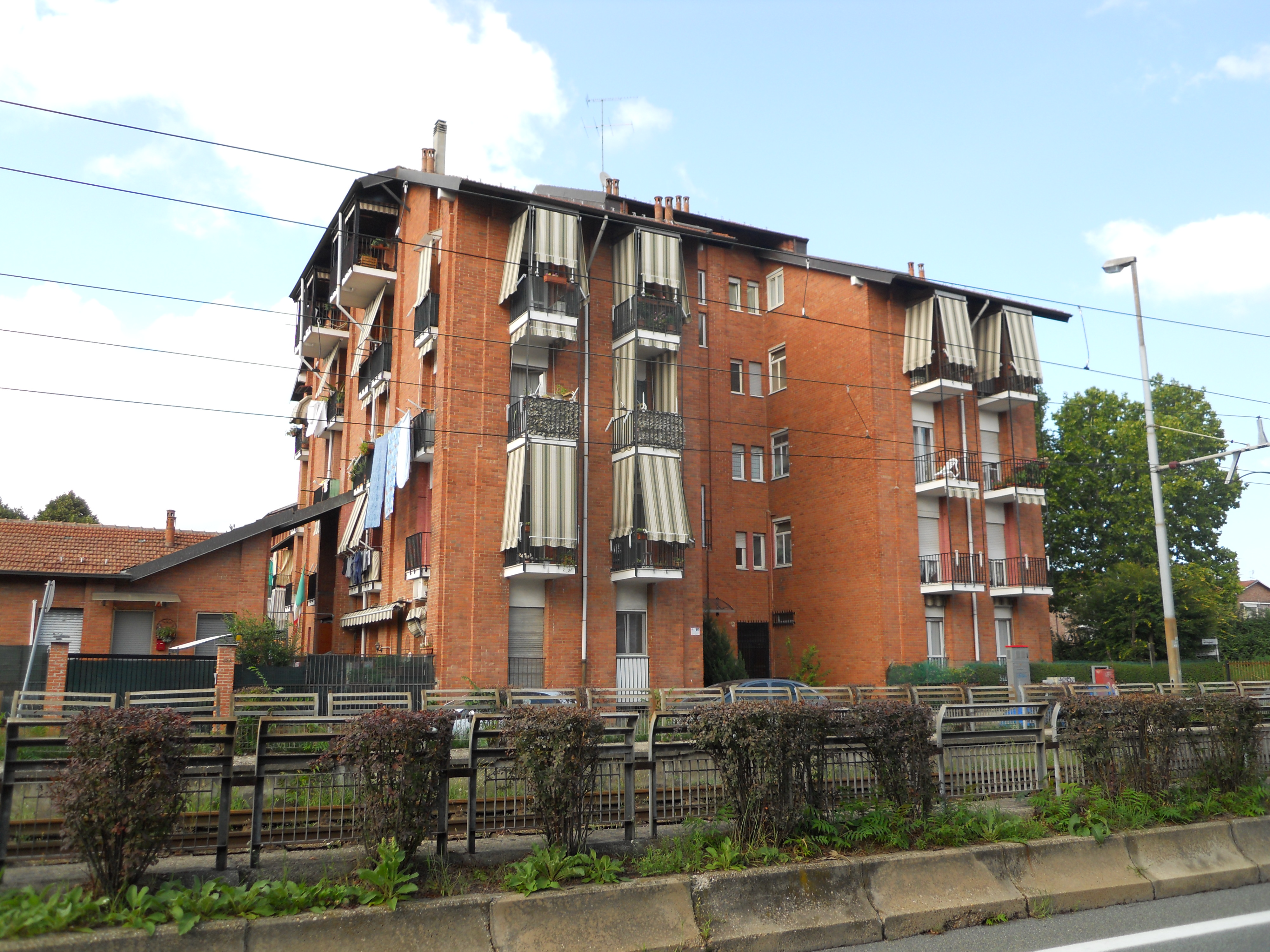 Altra tipologia di abitazione nel quartiere Vallette